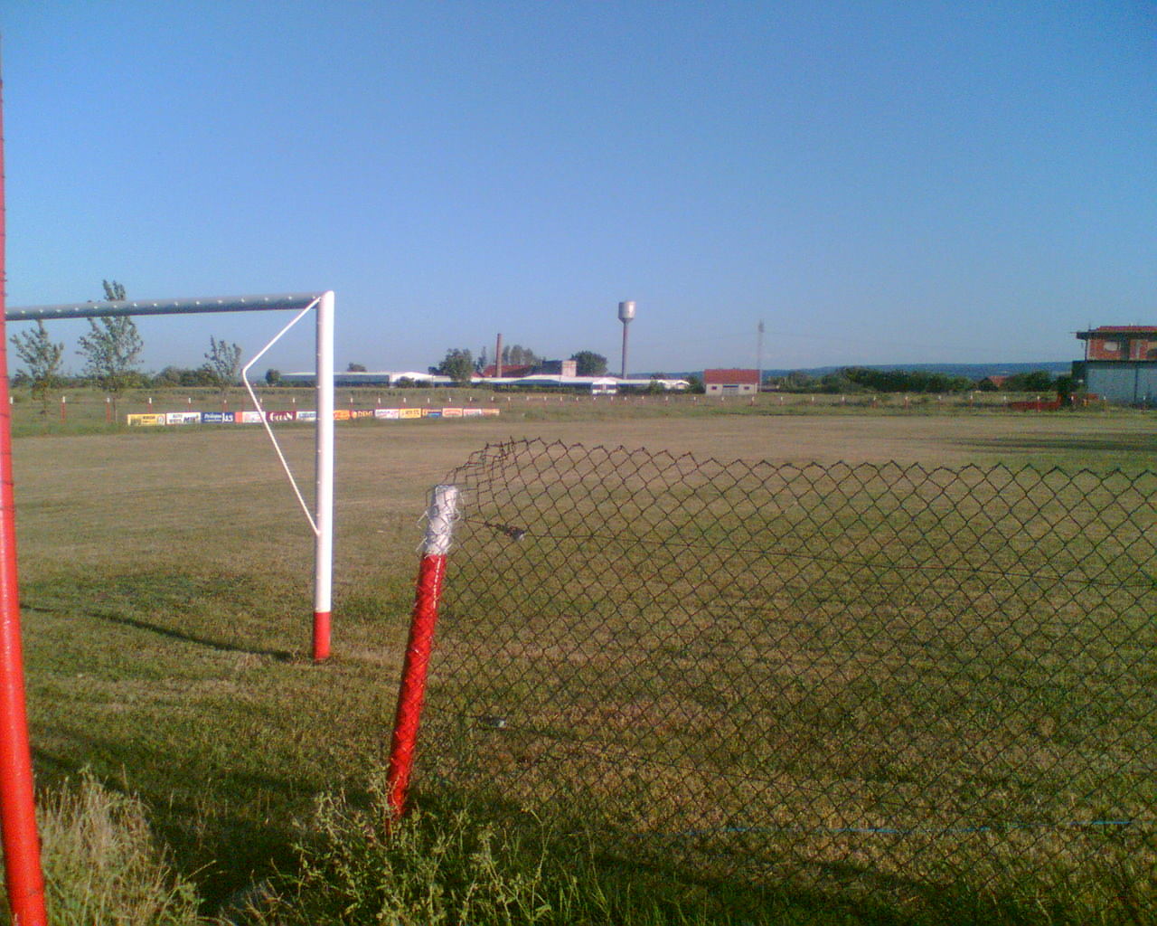 Stadion Milosevo.